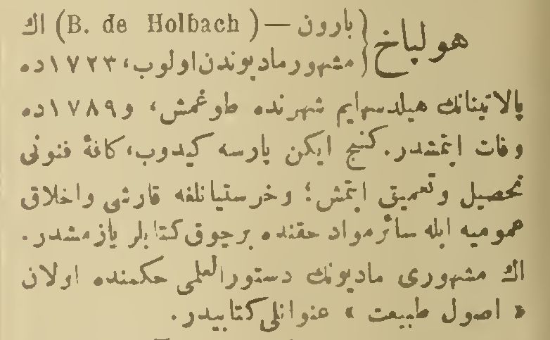 Şemseddin Sâmi'nin Osmanlıca tarih, coğrafya ve biyografi ansiklopedisi Kamusu'l-A'lam'ında Holbach (هولباخ) maddesi.